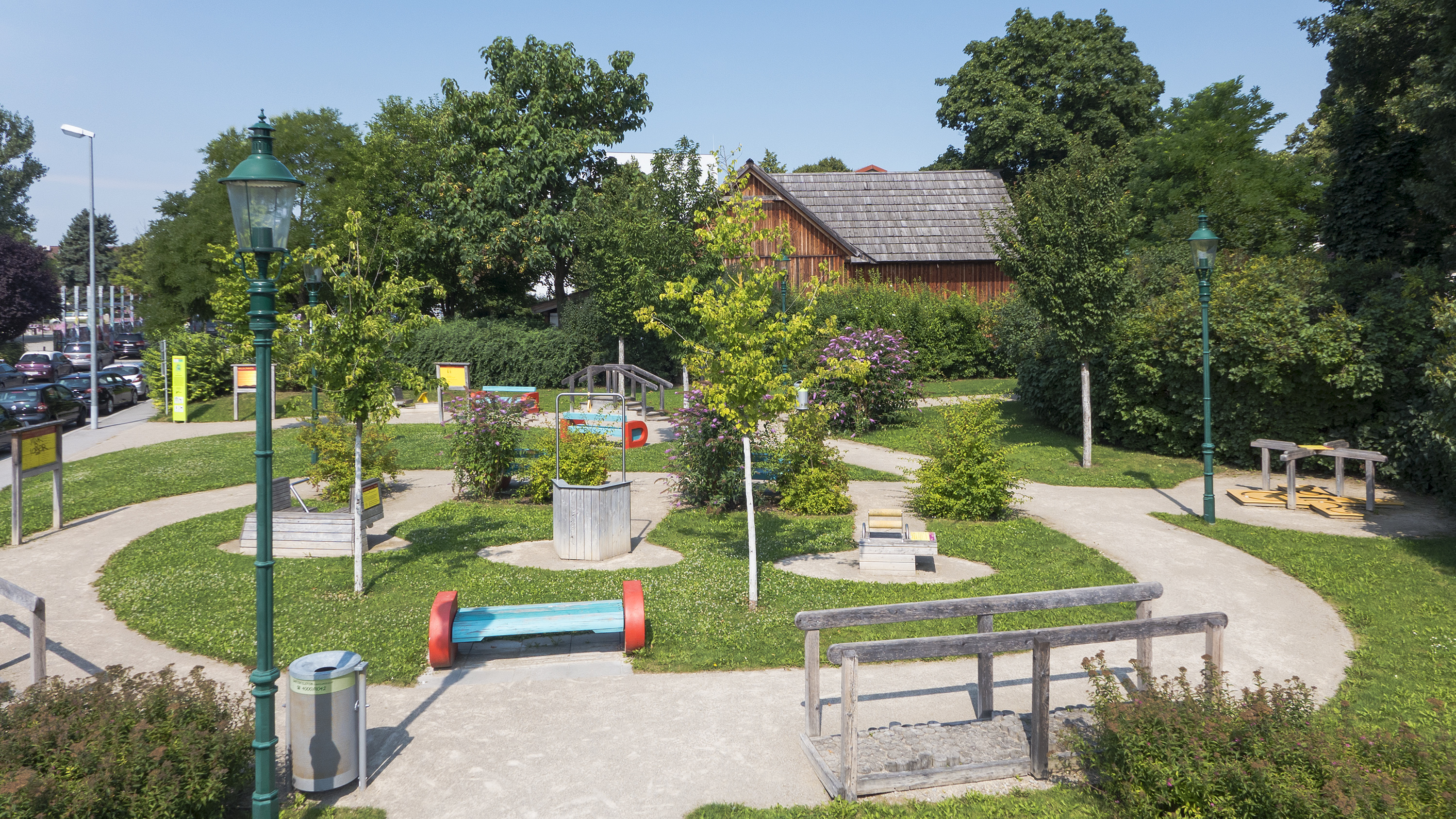 Jazzpark Essling in Wien 22